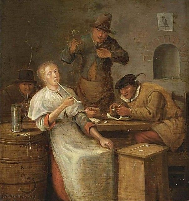 Peasants Drinking And Smoking In An Interior